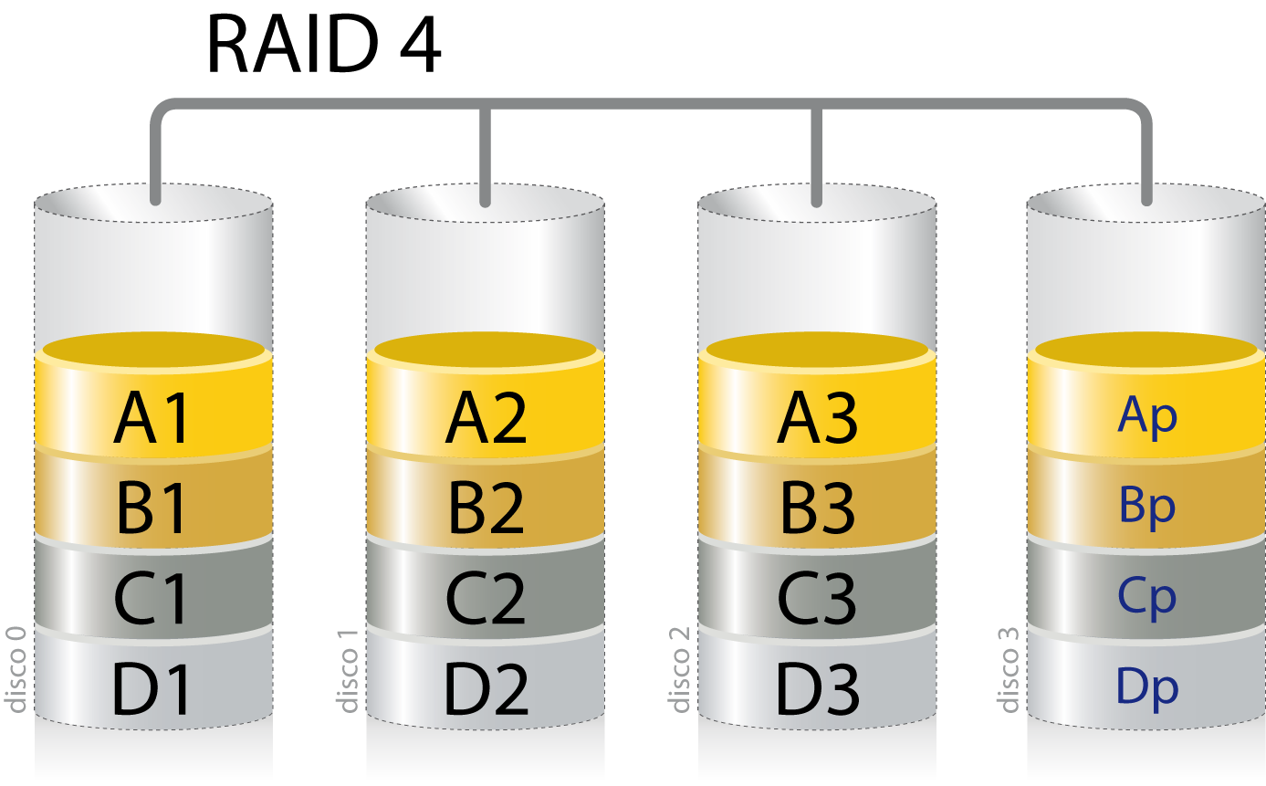 Esquema RAID 4